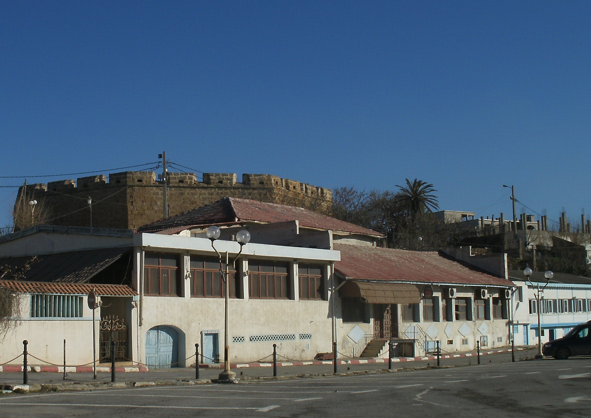 Le fort turc à Tamentfoust